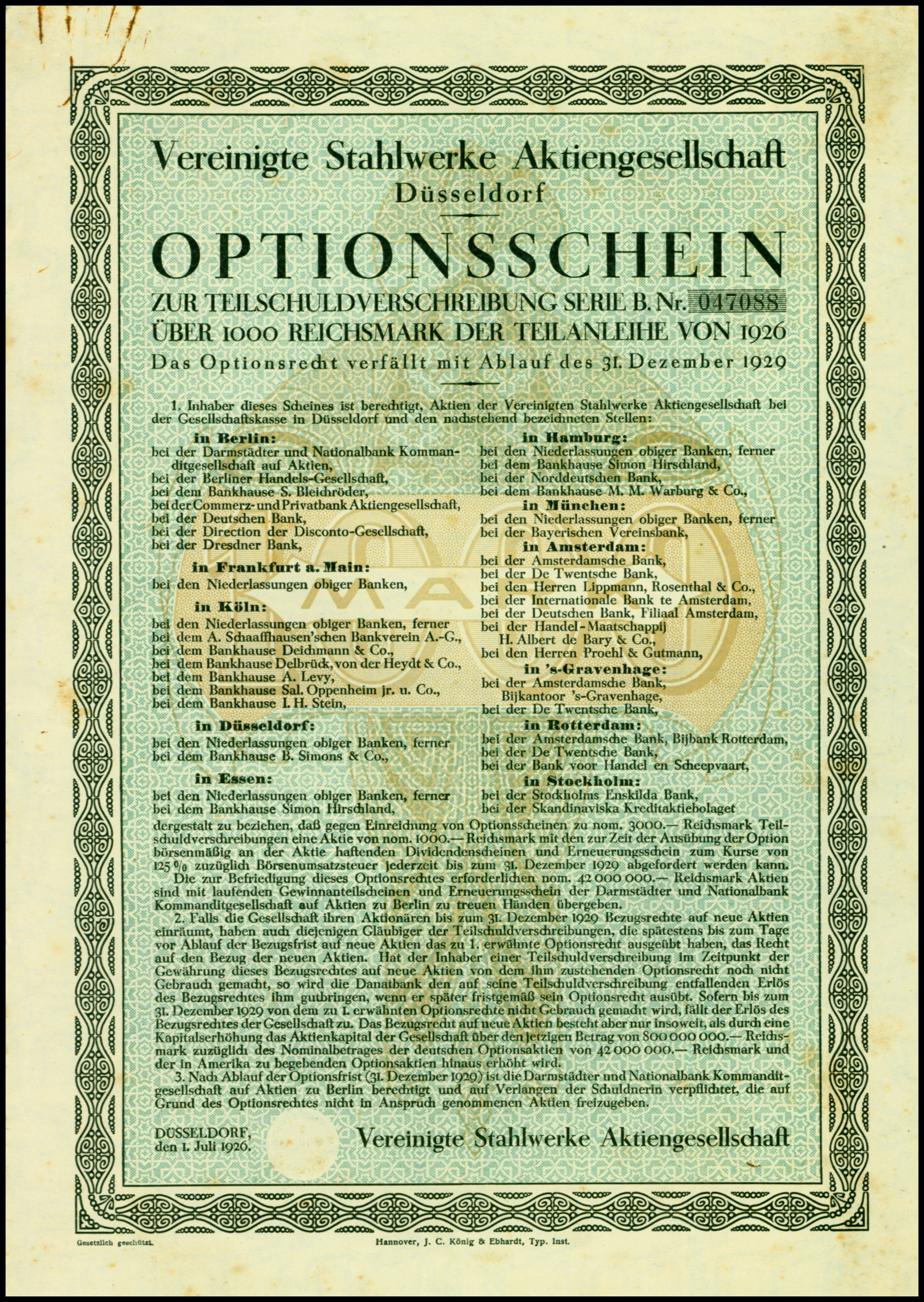 Optionsschein über 1000 Reichsmark der Vereinigten Stahlwerke AG vom 1. Juli 1926; aus dem Fundus des Ersten Deutschen Historic-Actien-Museum e.V. (EDHAM), Kürnbach